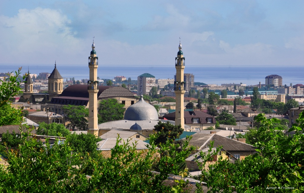 Город Дербент. Дагестан. Россия